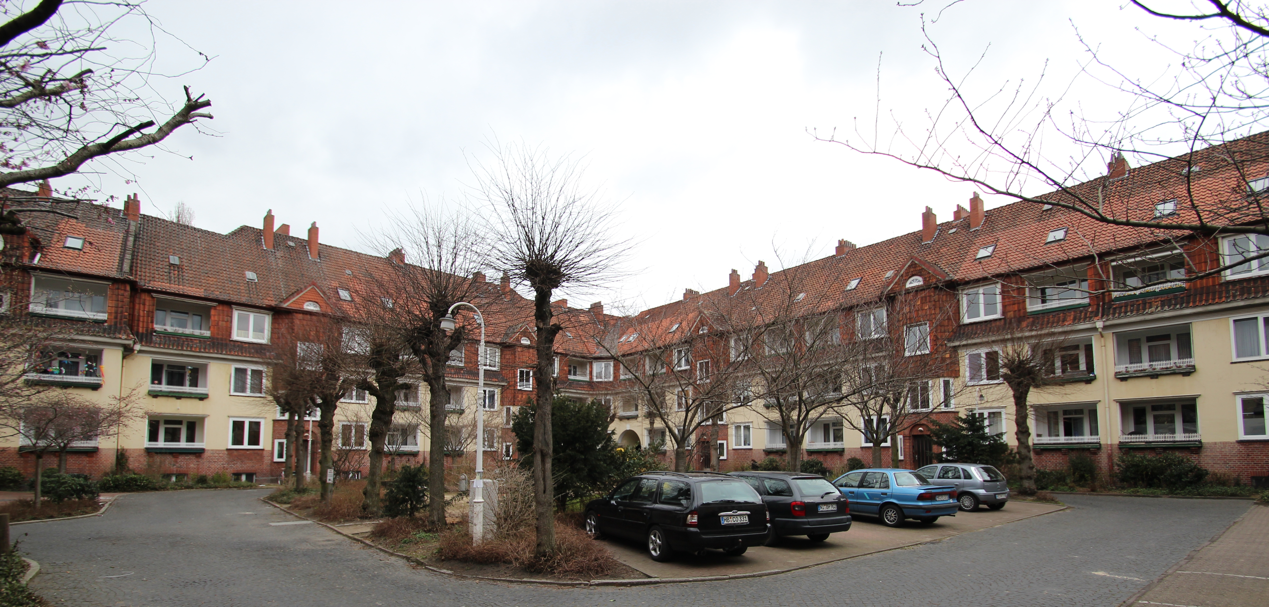 Breitenbachhof in Bremen, Breitenbachhof 1. Die Gesamtanlage ist ein geschütztes Kulturdenkmal in der Freien Hansestadt Bremen, mit der Nr. 0680 beim Landesamt für Denkmalpflege registriert.